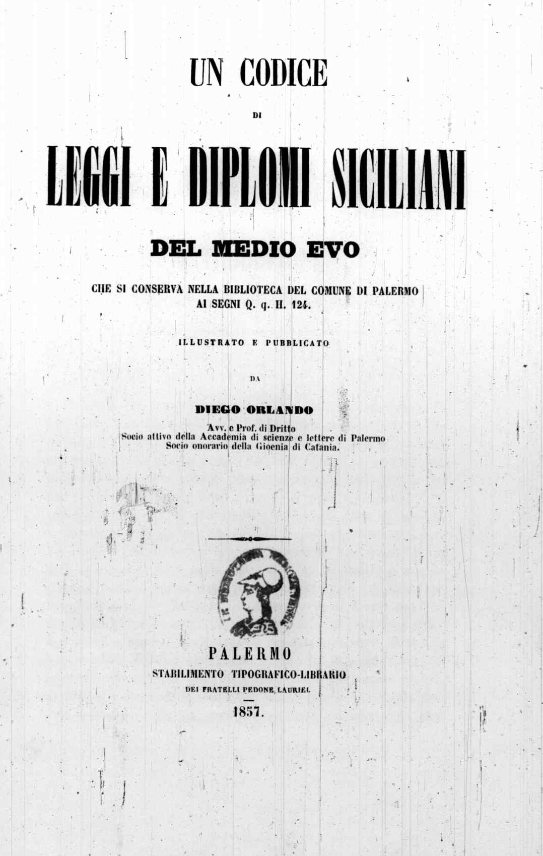 Frontespizio